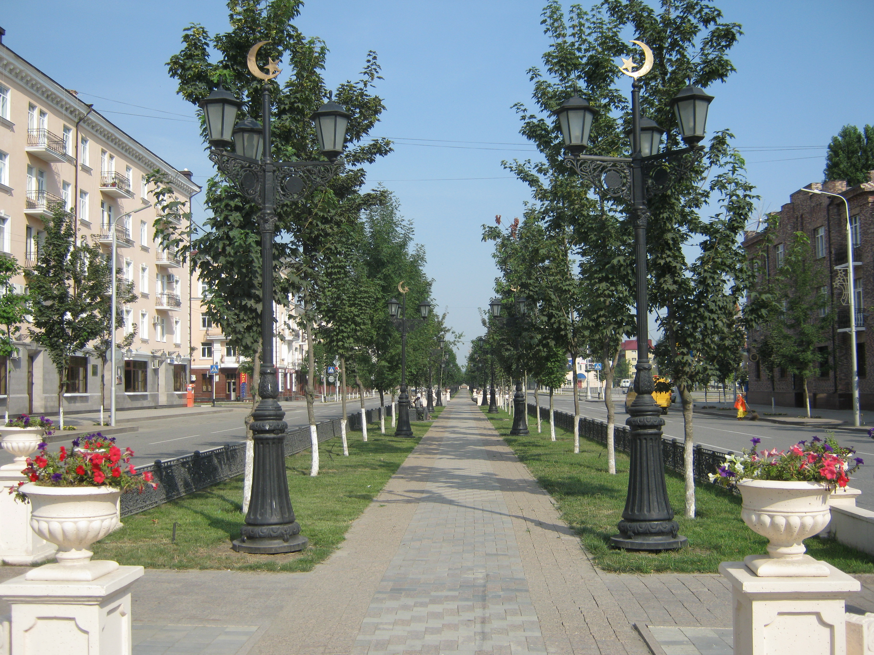 Грозный, проспект Путина